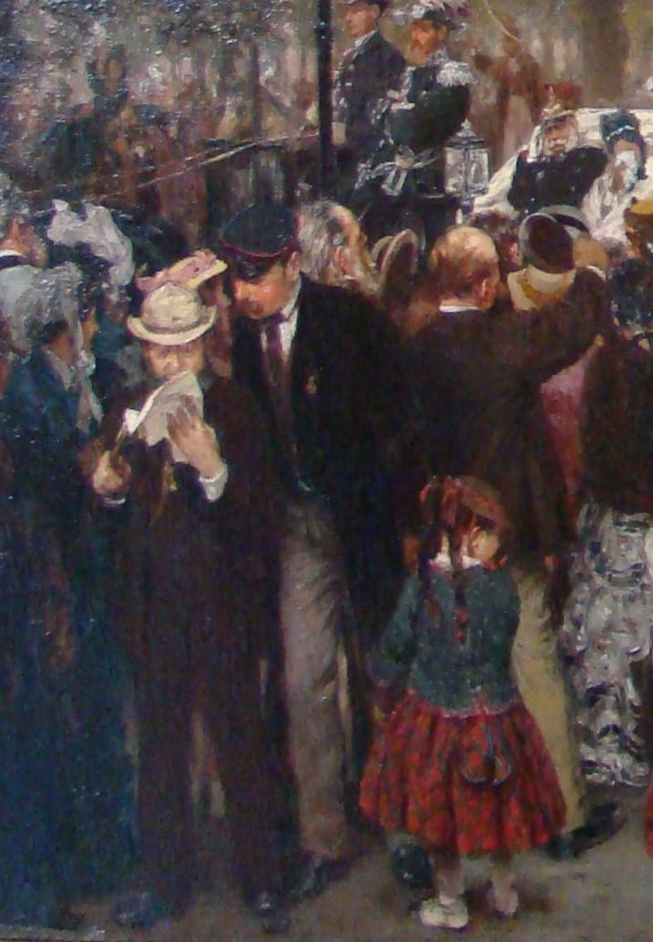 Ausschnitt aus dem Gemälde Abreise König Wilhelms I. Zur Armee am 31. Juli 1870, der vermutlich den Künstler selbst zeigt